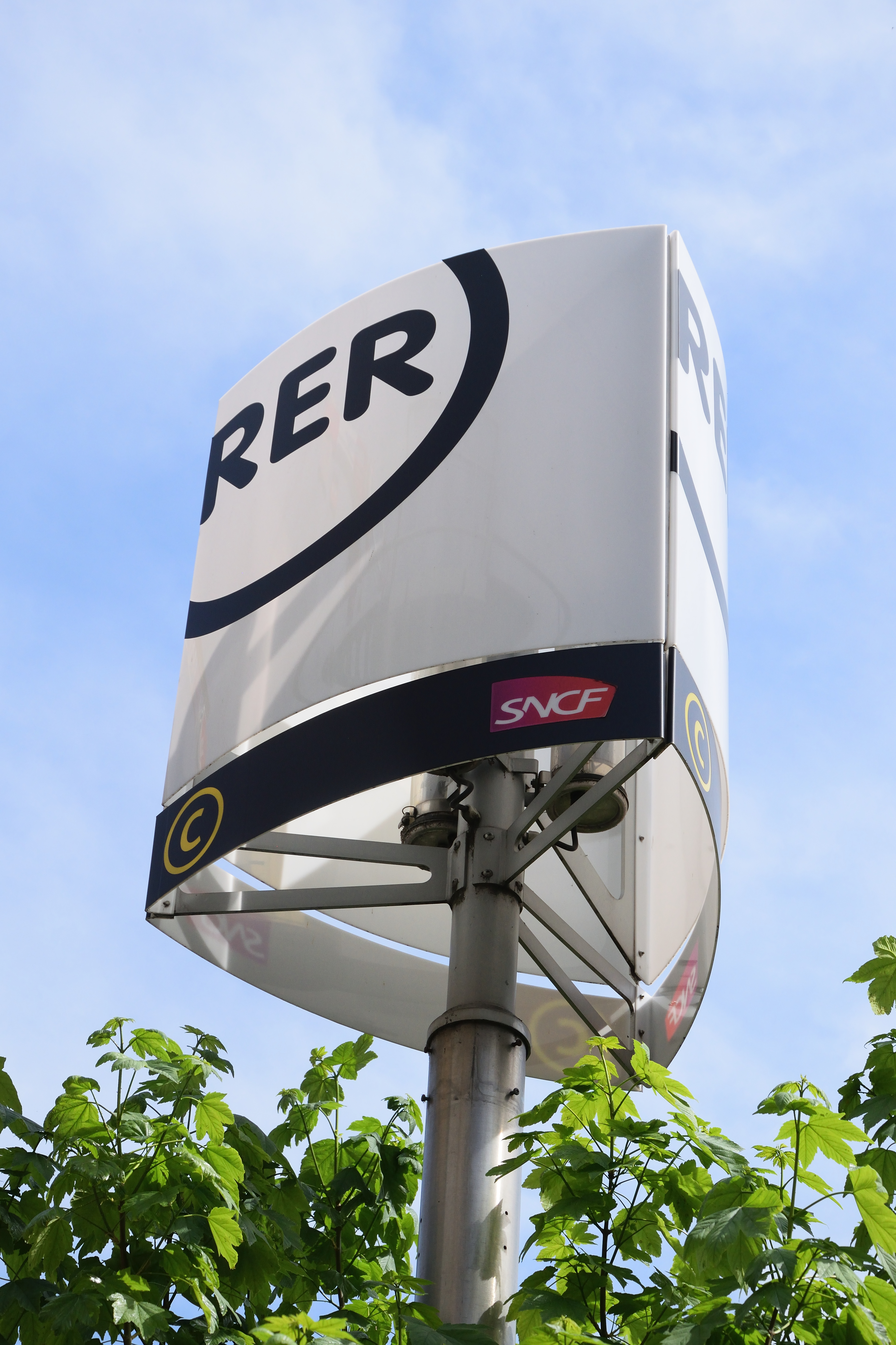 Signe du RER C à la gare d'Issy-Val de Seine, à Issy-les-Moulineaux, Hauts-de-Seine, France.